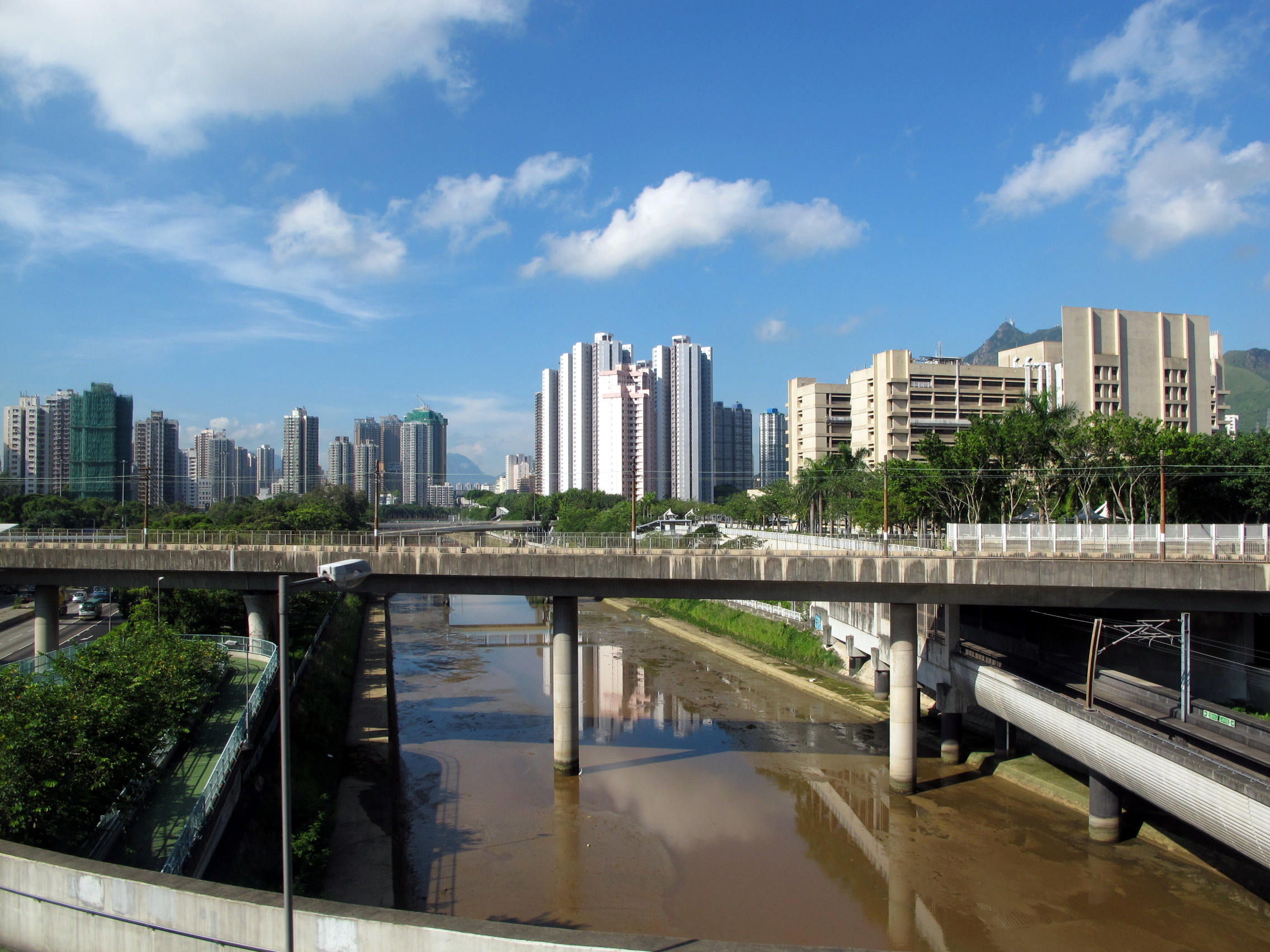 Tuen Mun River